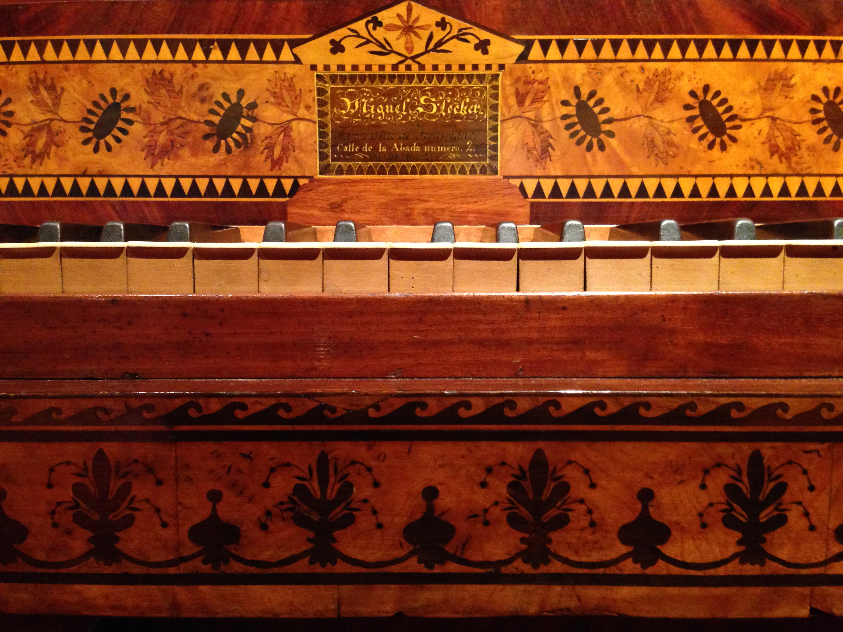 Detall de la marca i el teclat del piano de Miguel Slocker, fabricat al 1831, que es troba al Museu de la Música de Barcelona References MDMB 494 : piano de taula (1831) Slocker, Miguel (Autor). Museu de la Música, El web de la ciutat de Barcelona.